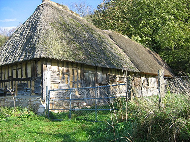 Marais Vernier, Eure, Haute-Normandie